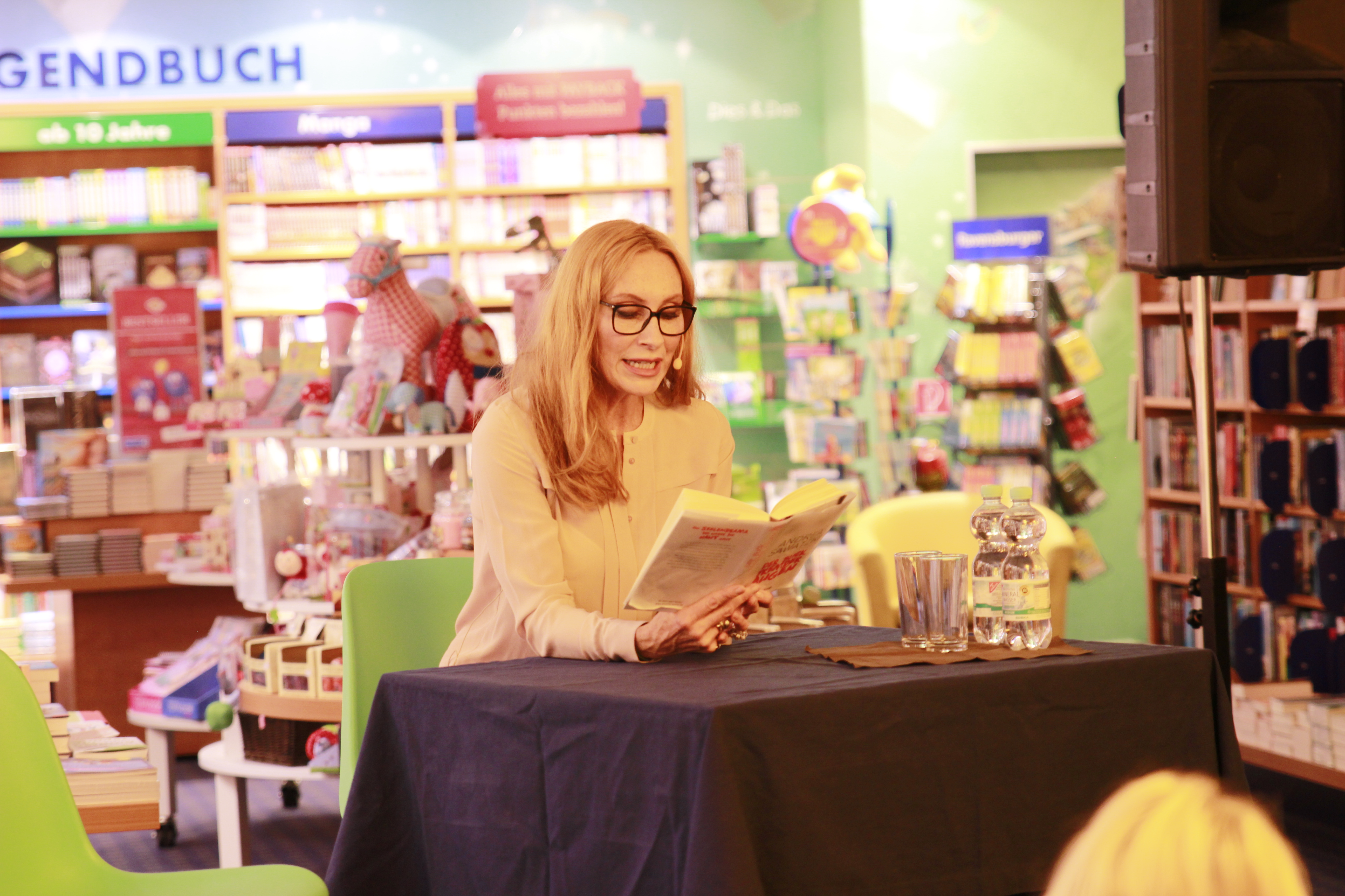 Andrea Sawatzki während einer Lesung am 1. September 2015 in einer Neubrandenburger Buchhandlung